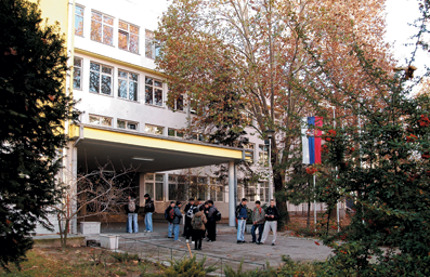 ТШ ”Јован Вукановић” у Гагариновој улици бр.1 у Новом Саду.